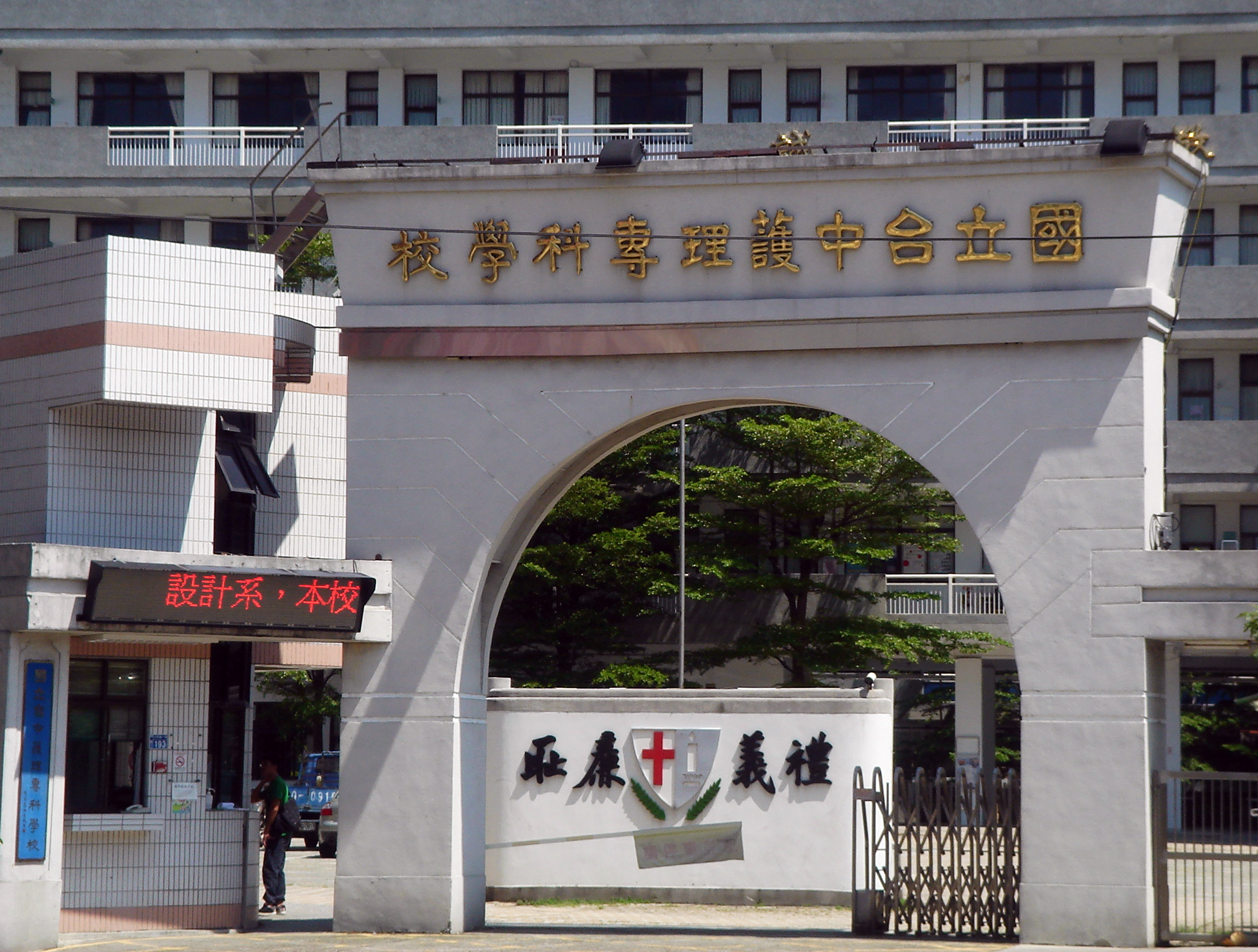 國立臺中護理學校